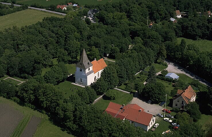 Motiv: Näs kyrka Nyckelord: Flygbilder, Riksintressen Kategori: Kyrkomiljö Näs kyrka